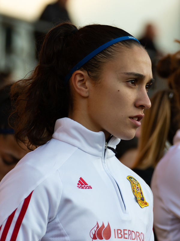 Nahikari García at a match vs Germany in November 2018